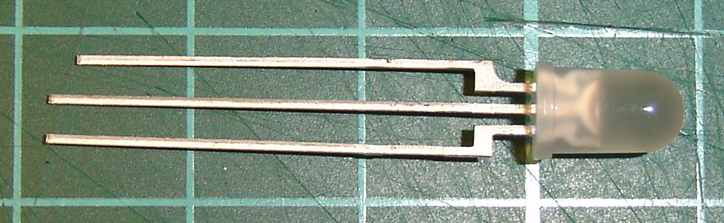 2 Color LED